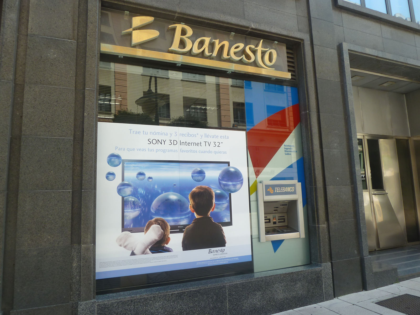 Banco